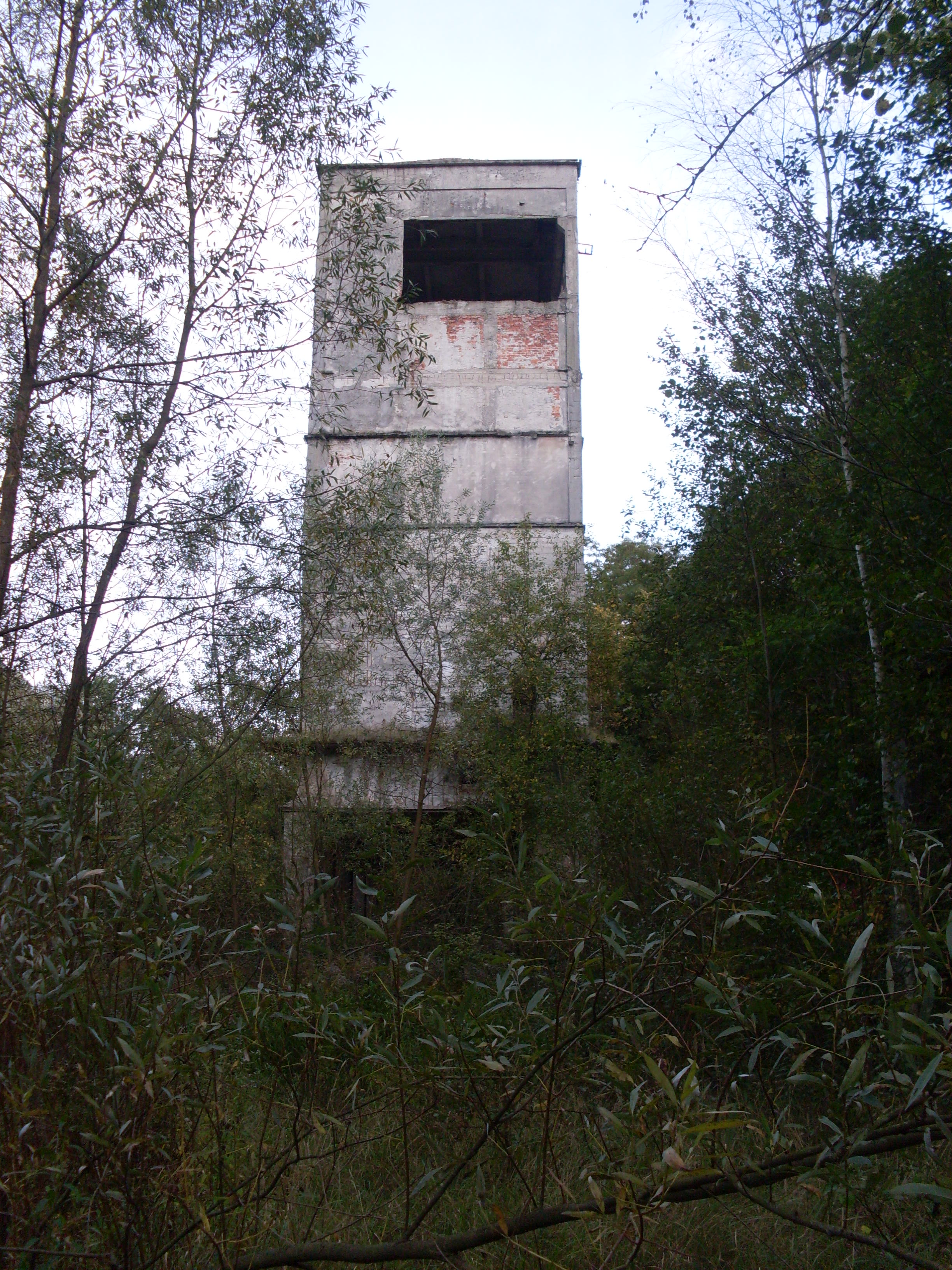 Byłe młyny kamieniarskie.Miękinia